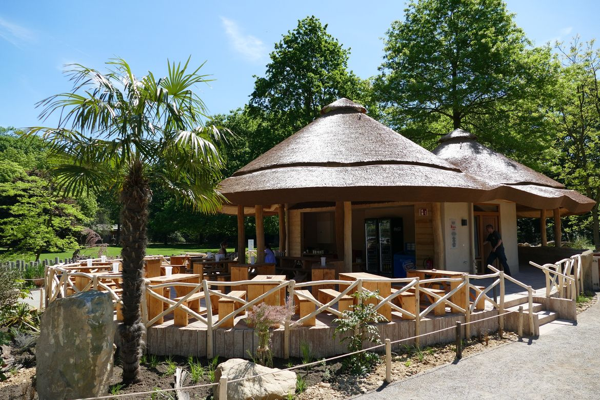 ErdmännchenLodge des Krefelder Zoos